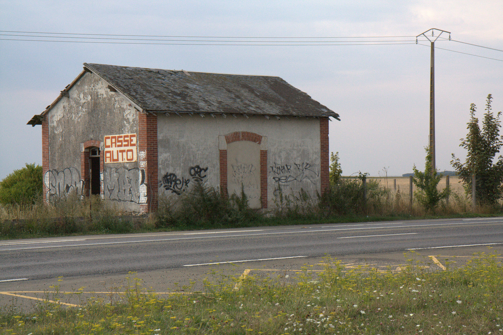 ancienne station de Montboissier des Tramways d'Eure-et-Loir sur la ligne Bonneval - Chartres, détruite durant l'hiver 2016-2017, Eure-et-Loir, France.